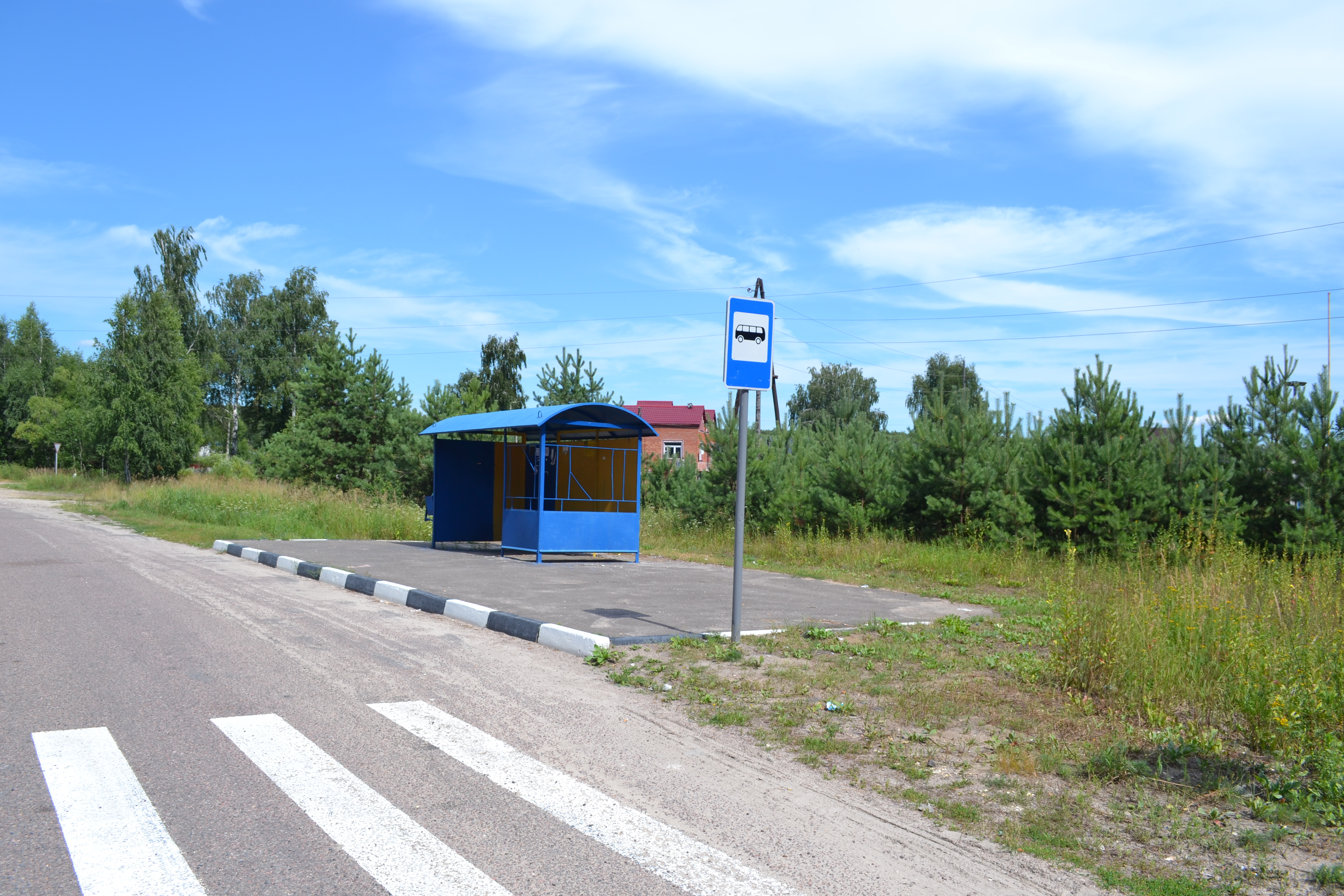 Остановка в деревне Дубасово (Шатурский район)